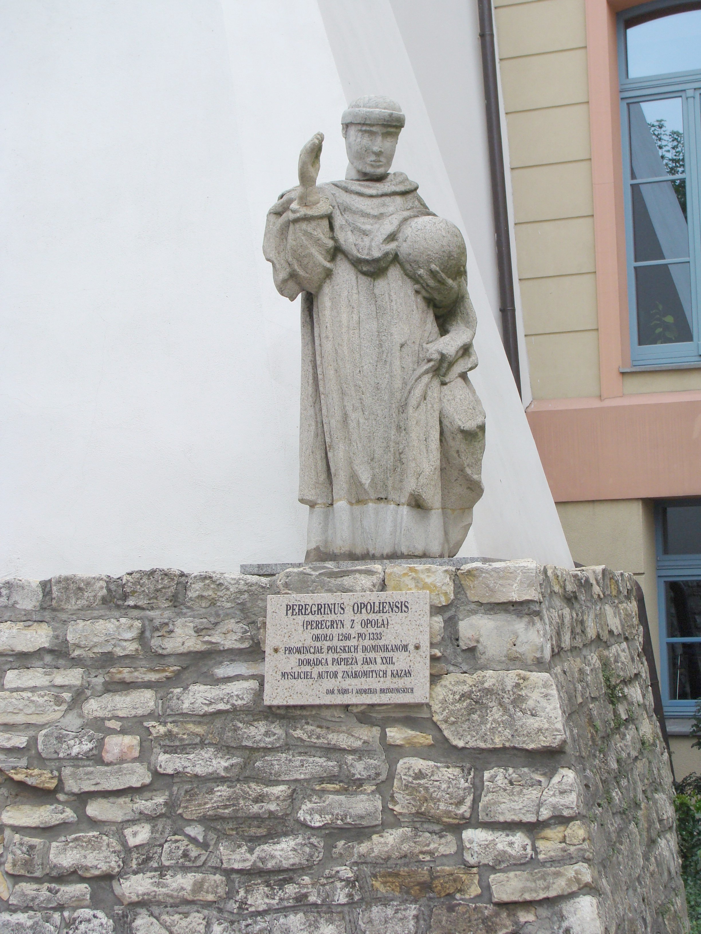 Peregrynus Opoliensis obok budynku Rektoratu UO w Opolu